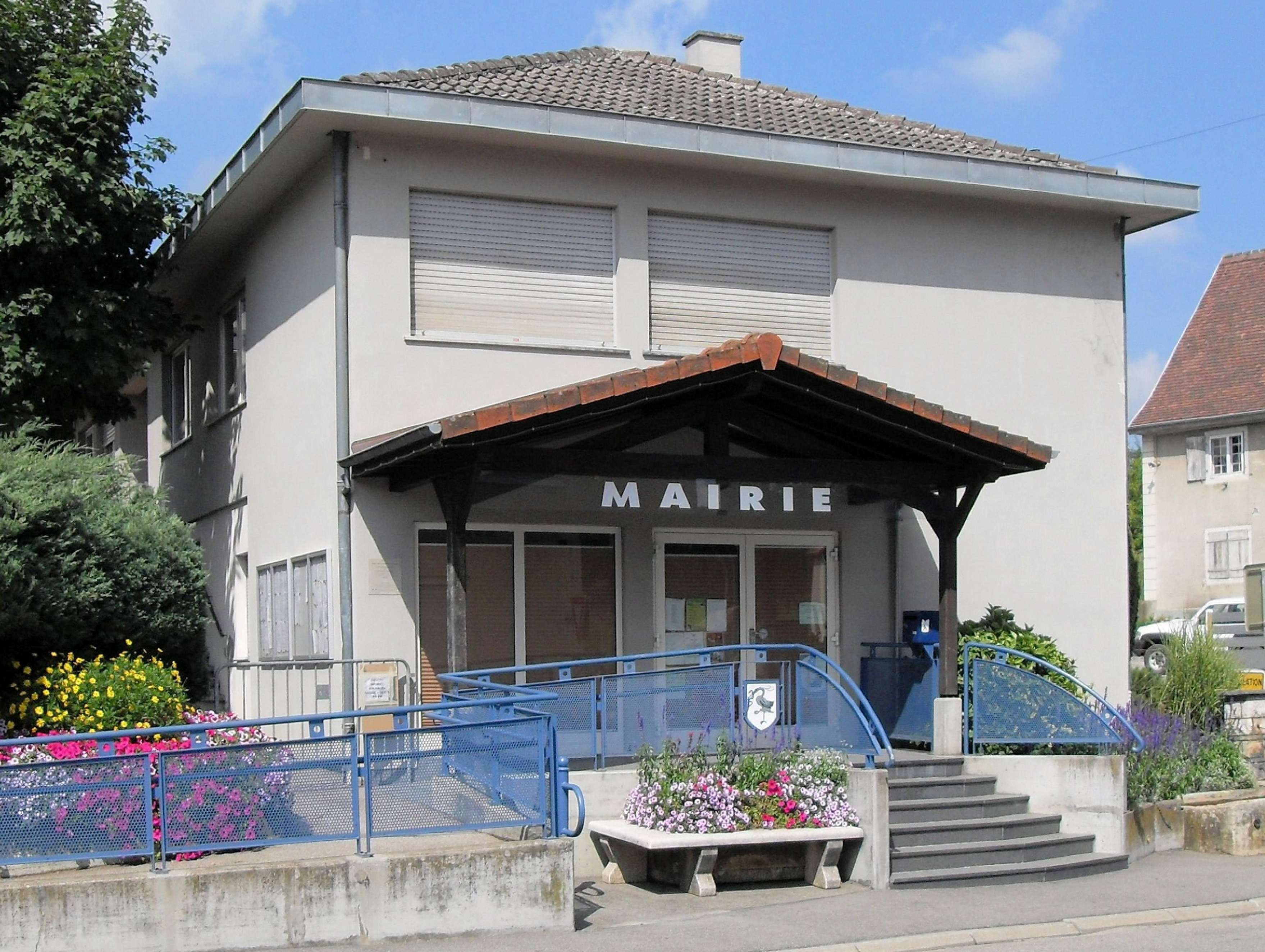 La mairie de Hagenthal-le-Bas